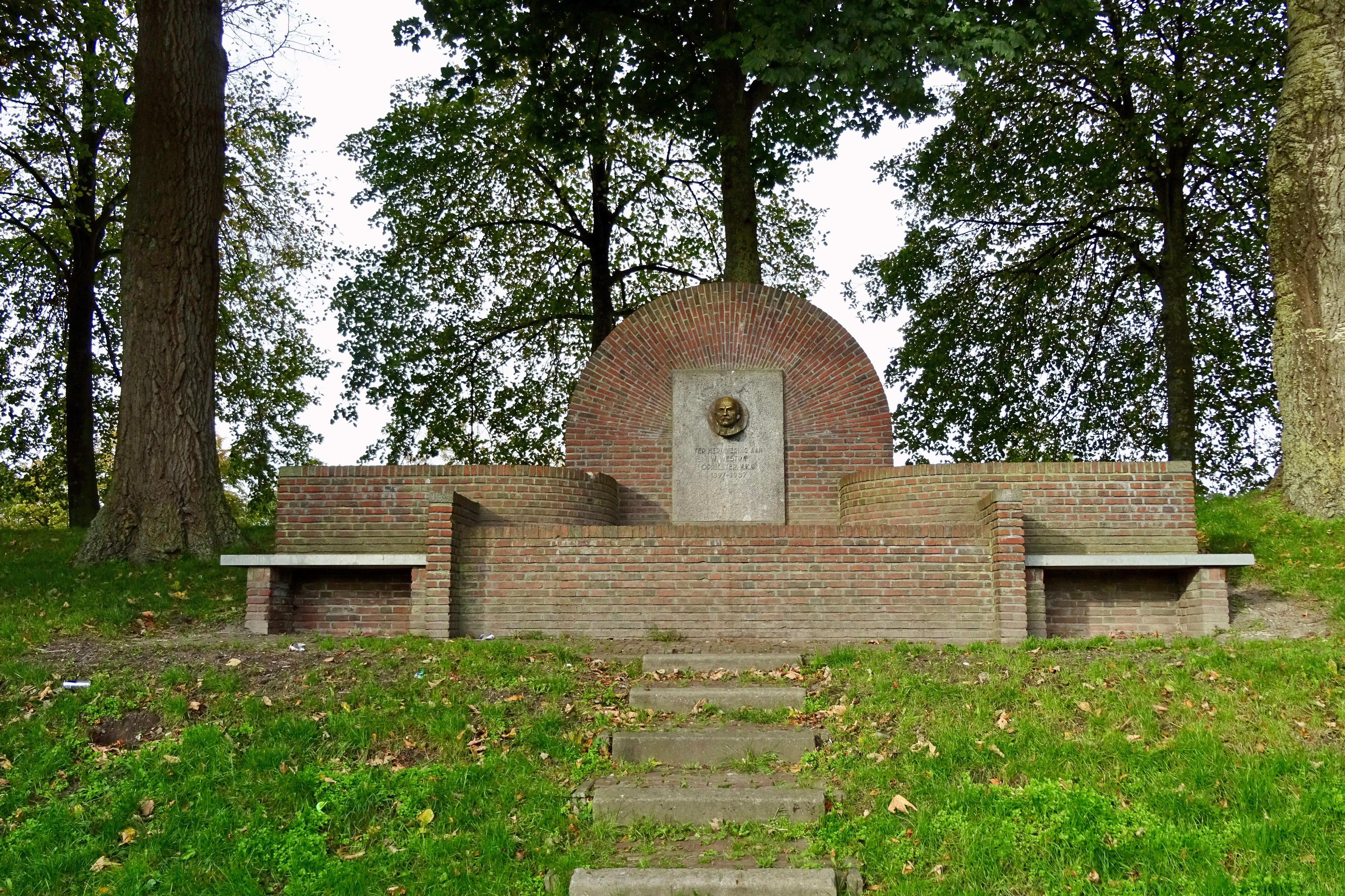 De Westrabank door Gerhardus Jan Adema